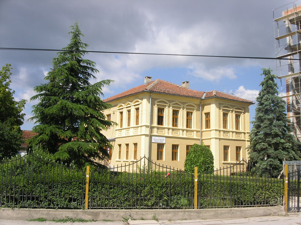 Shkolla e Muzikës në Gjilan